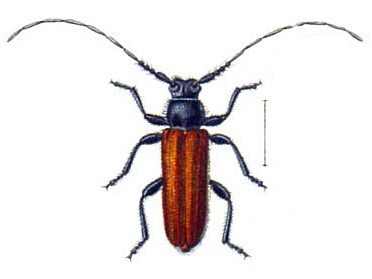 Anisarthron barbipes